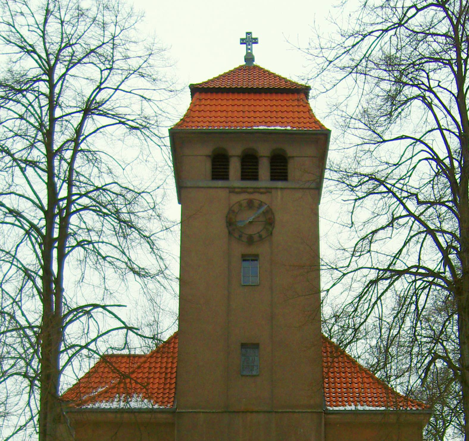 Ausschnitt der